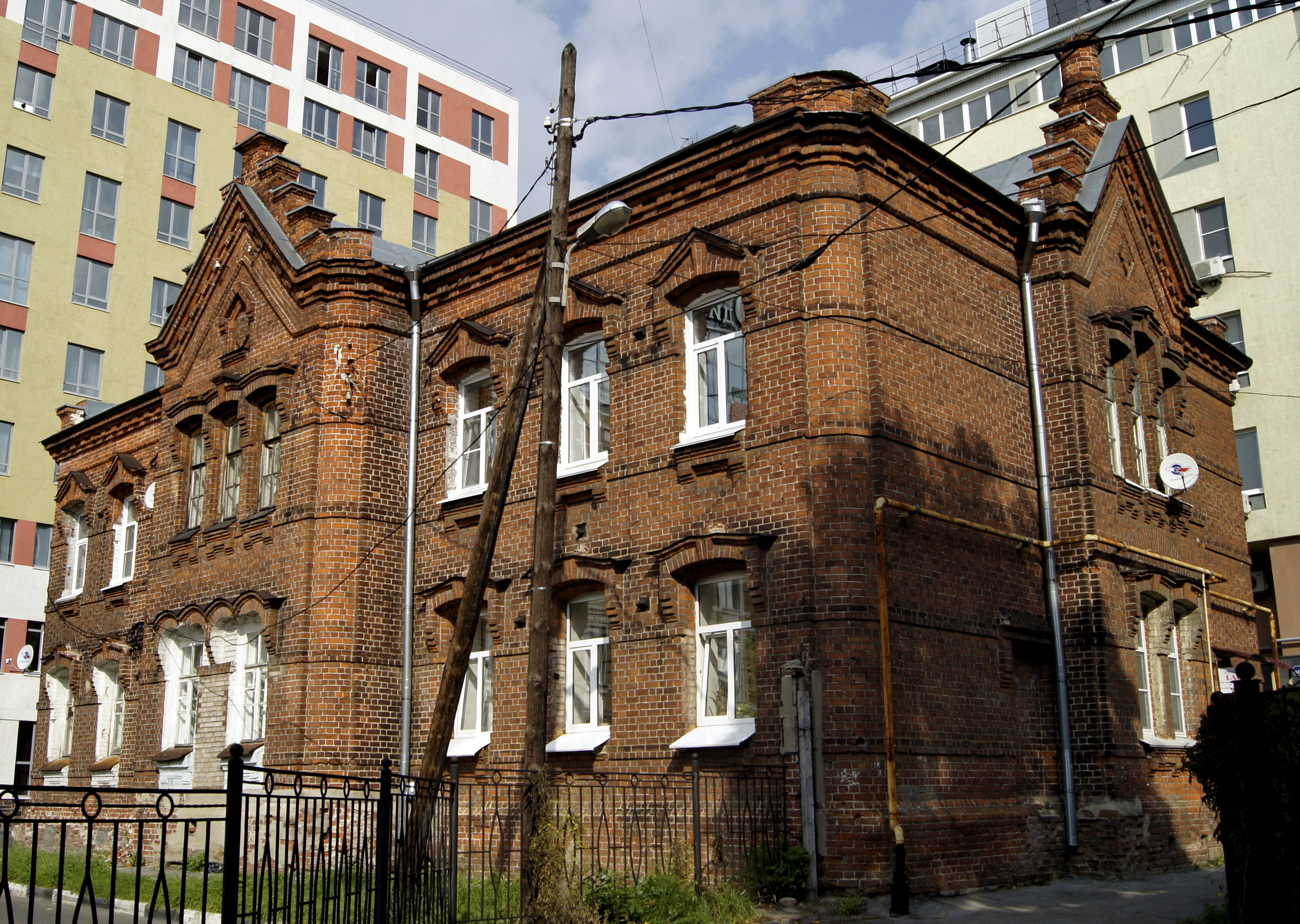 Богадельня: улица Большая Печерская, 28в, Нижний Новгород, Нижегородская область